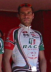 Yoann Le Boulanger. R.A.G.T. Semences, Euskal Bizikleta 2005